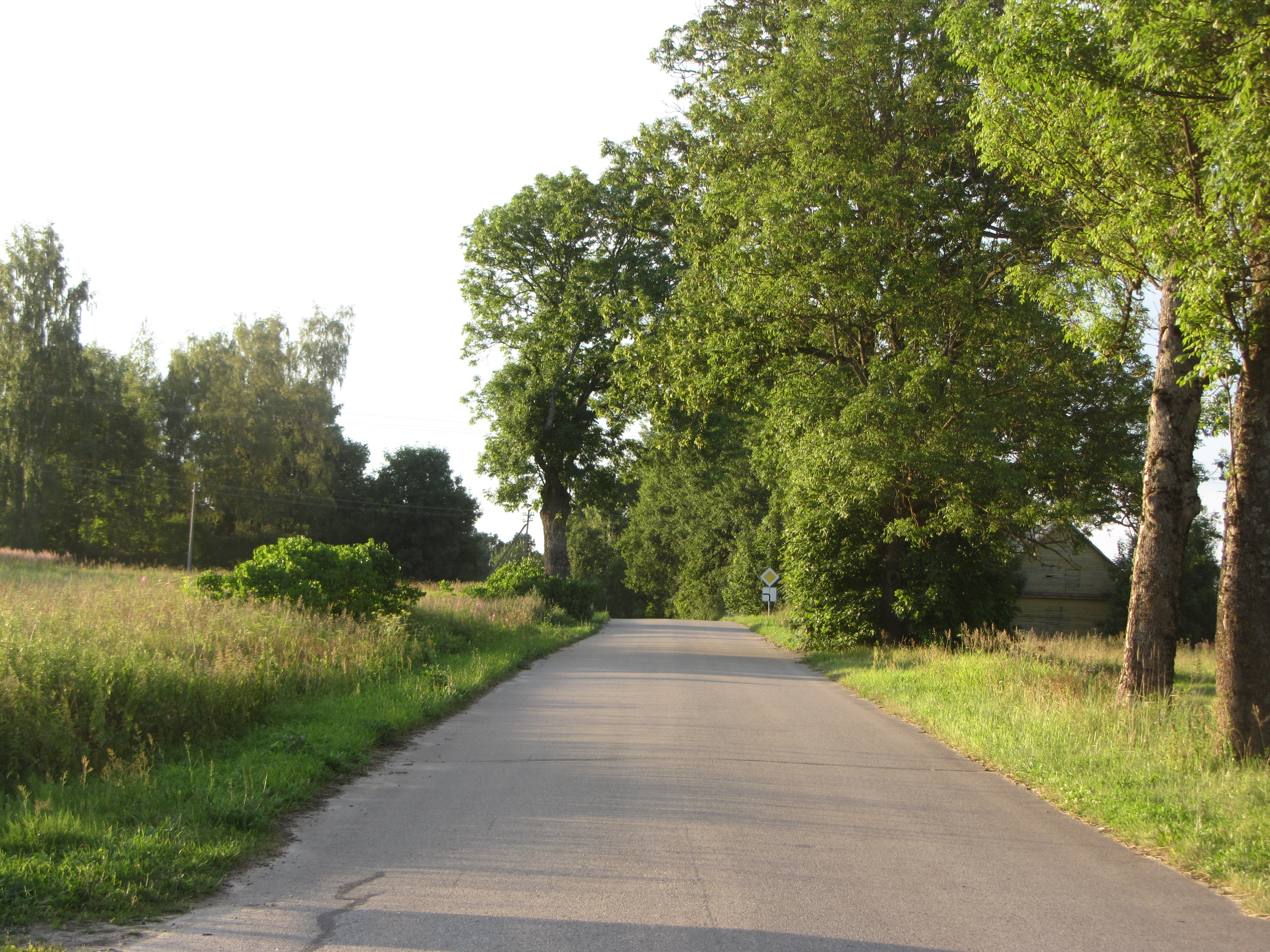 Antandraja, Lithuania